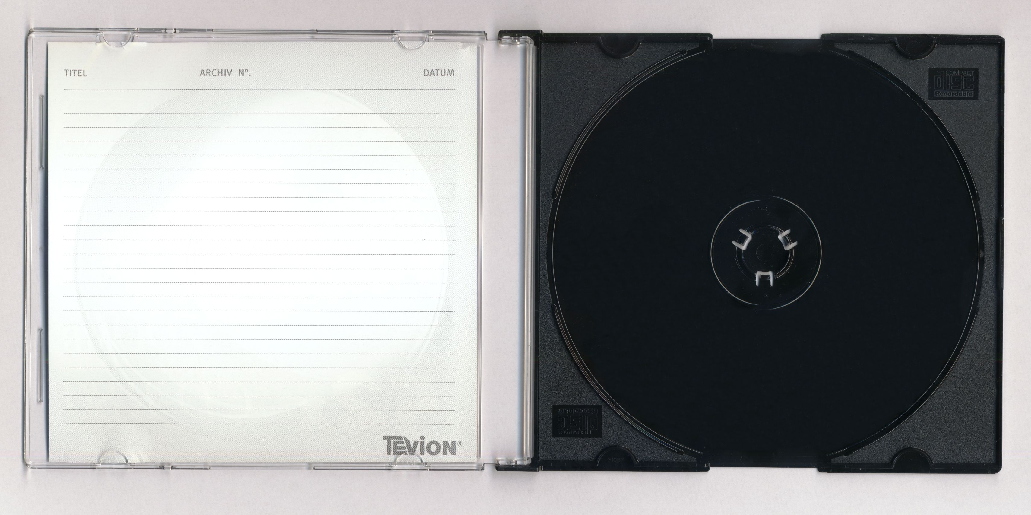 Slimcase